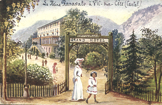 Reine Ravalona III en séjour de cure à Vic-sur-Cère en Auvergne. Carte postale française sans nom d'auteur ni d'éditeur ni date.